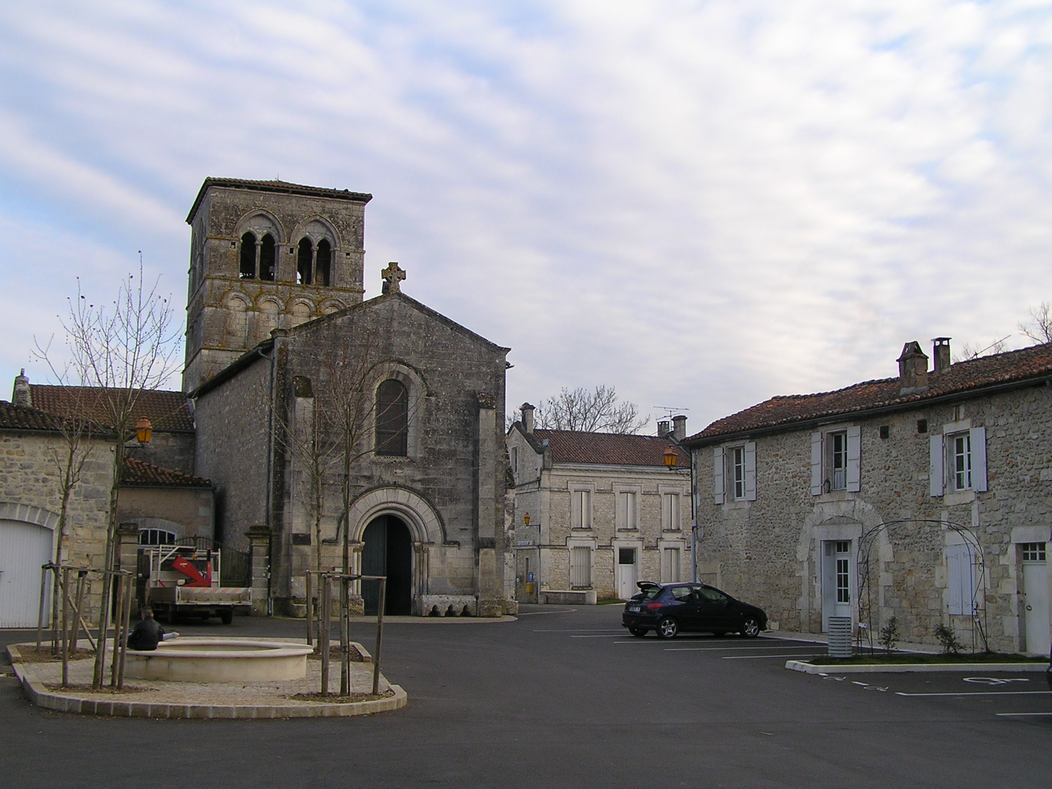 église de Chazelles, Charente, France